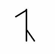 Paint programı ile çizdim.